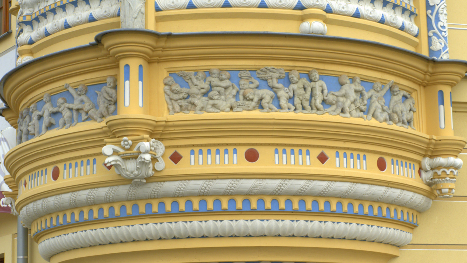 Renaissancefries "Kinder der Weisheit", Neumarkt 12, Ecke Frauenstrasse, Dresden